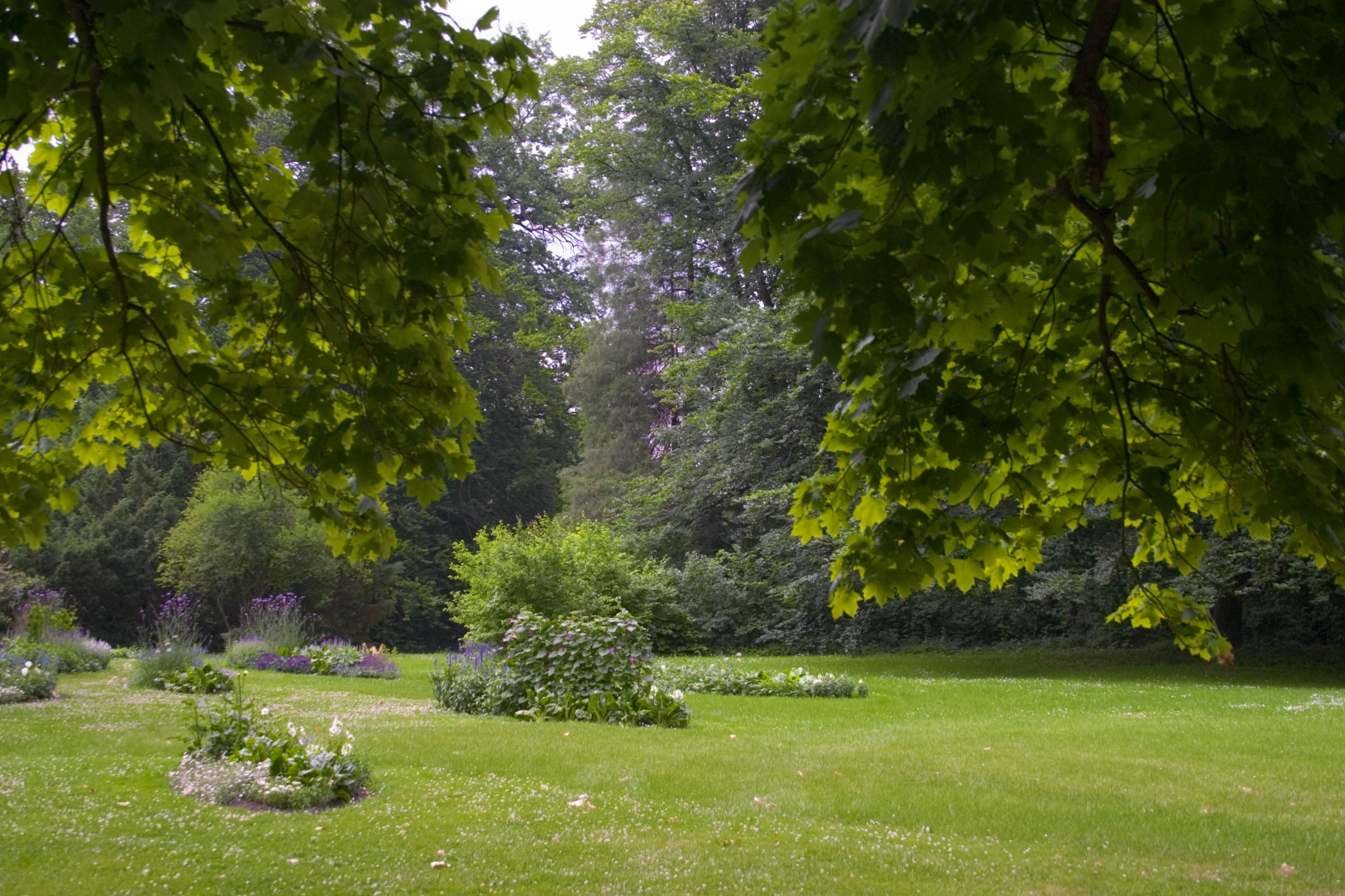 Fürst-Pückler-Park (Park Mużakowski) Author: Adam Kumiszcza